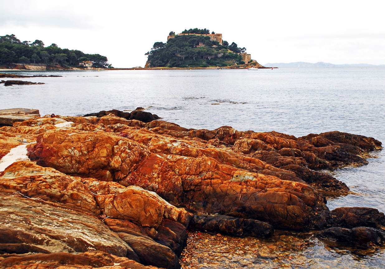 Fort de Brégançon